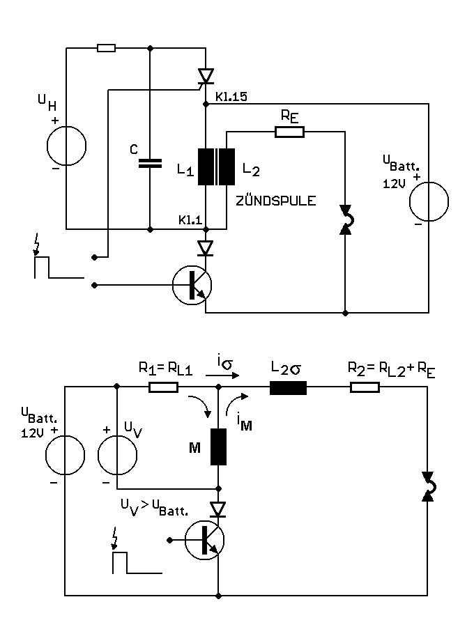 Prinzipschaltbild der Everding-HKZ